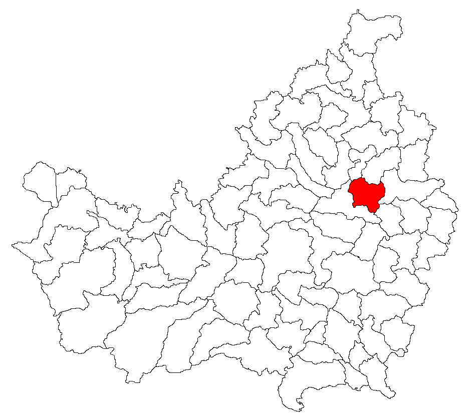 Categorie:Hărţi ale judeţului Cluj